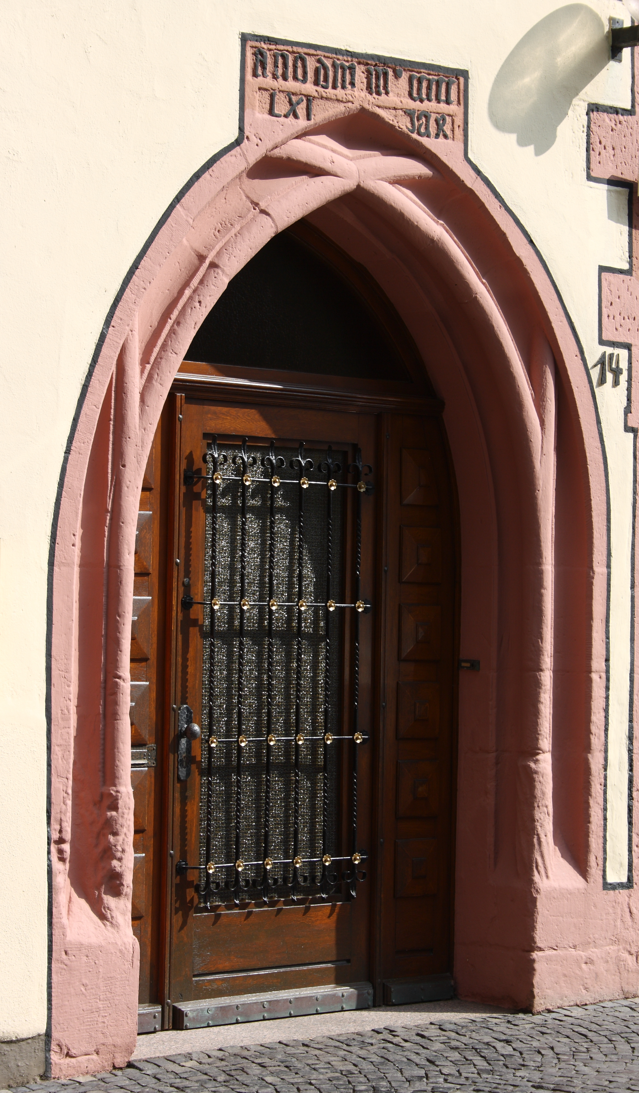 Apotheke am Rathaus in Alsfeld im Vogelsbergkreis (Hessen), Markt 14